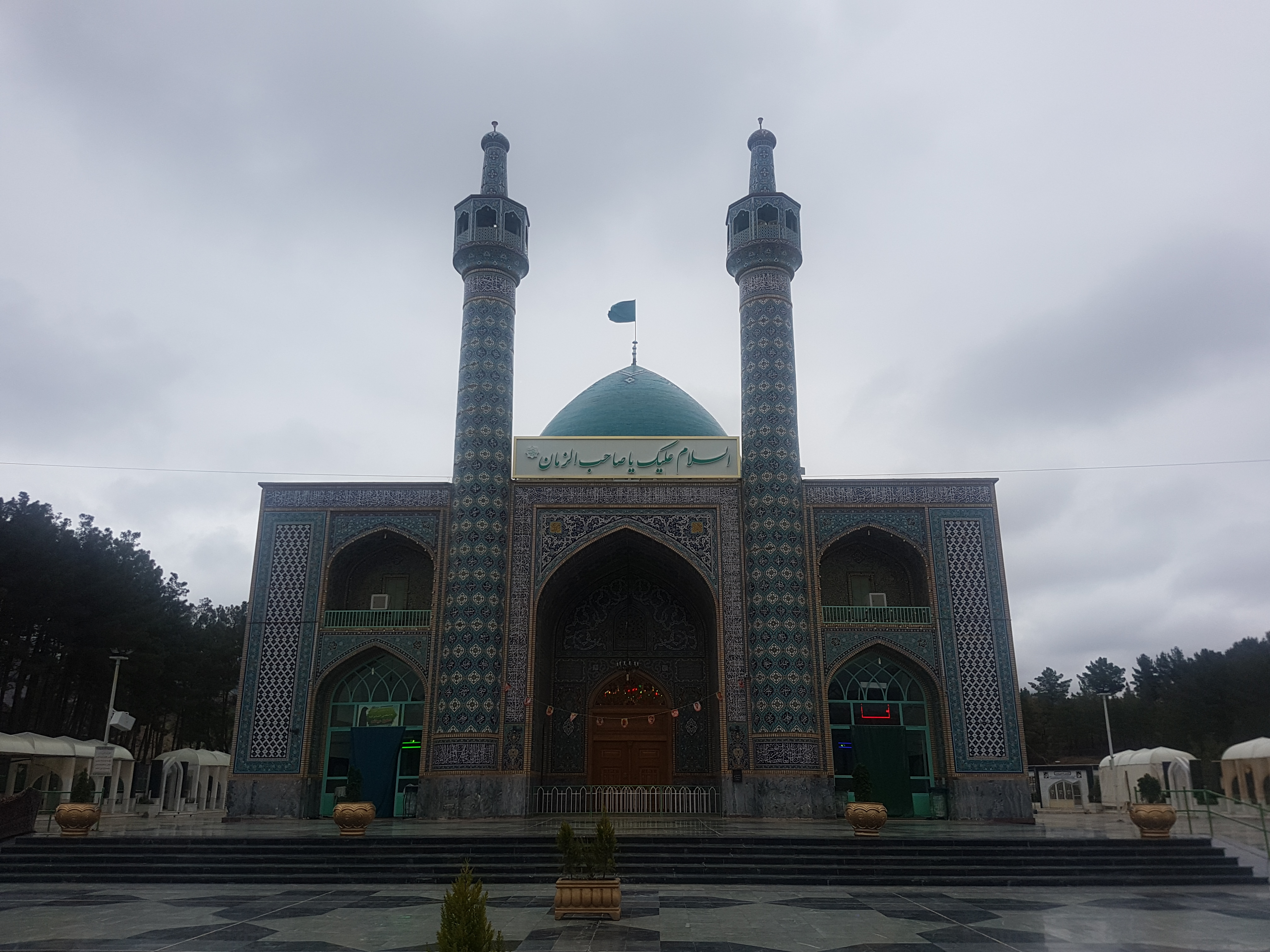 سید مرتضی درسده دوم هجری به محض اطلاع از شهادت برادر بزرگوارشان حضرت امام رضا (ع) با اندیشه خروج علیه مامون از بغداد بیرون آمد در حالی که هشت نفر از برادران و فرزندان آنها و عده ای همراه وی بودند و تدریجا"سایر یاران نیز از سادات و موالی هم بایشان پیوستند در مسیر خراسان میان وی با امیر دست نشانده مامون جنگی رخ داده و جمعی کثیری از موافقان و مخالفان به قتل می رسند و این دو برادر به سمت ترشیز پناه آورده و درآنجا به شهادت رسیده و مدفون شدند و قبورشان زیارتگاه عاشقان آل ا... می باشد .